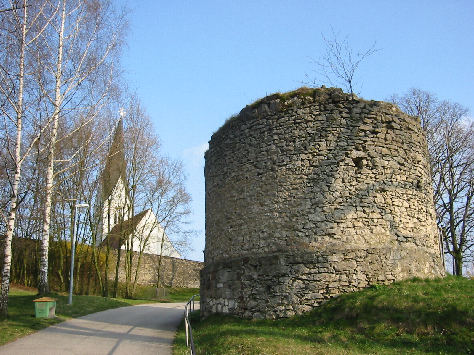 thumb|right|anderer Blickwinkel anderer Blickwinkel (Original text: Kirche "Zu unserer lieben Frau" und "Feiglturm") Sonstiges